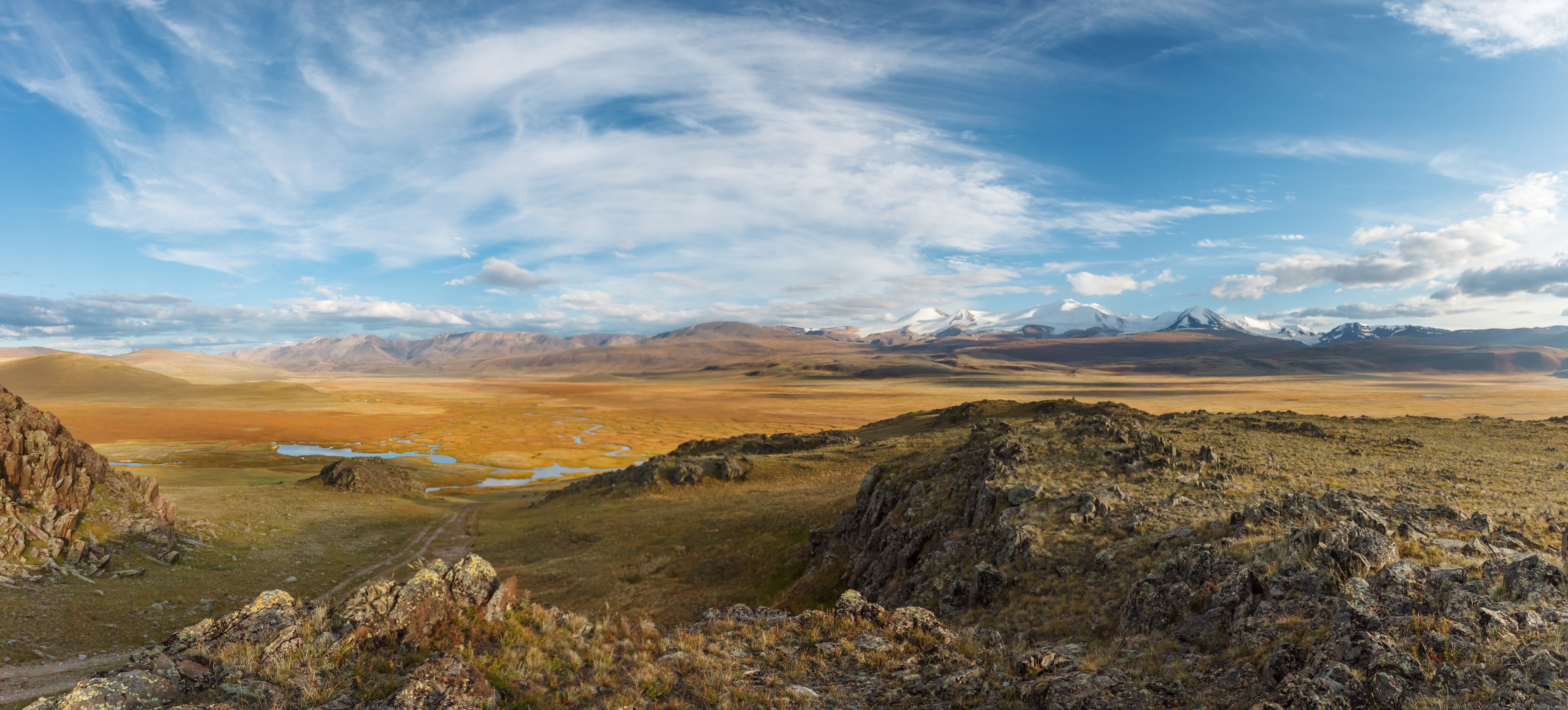 Зона покоя — плато Укок: Кош-Агачский район, Алтай This image is related to the protected area of Russia number 0410005